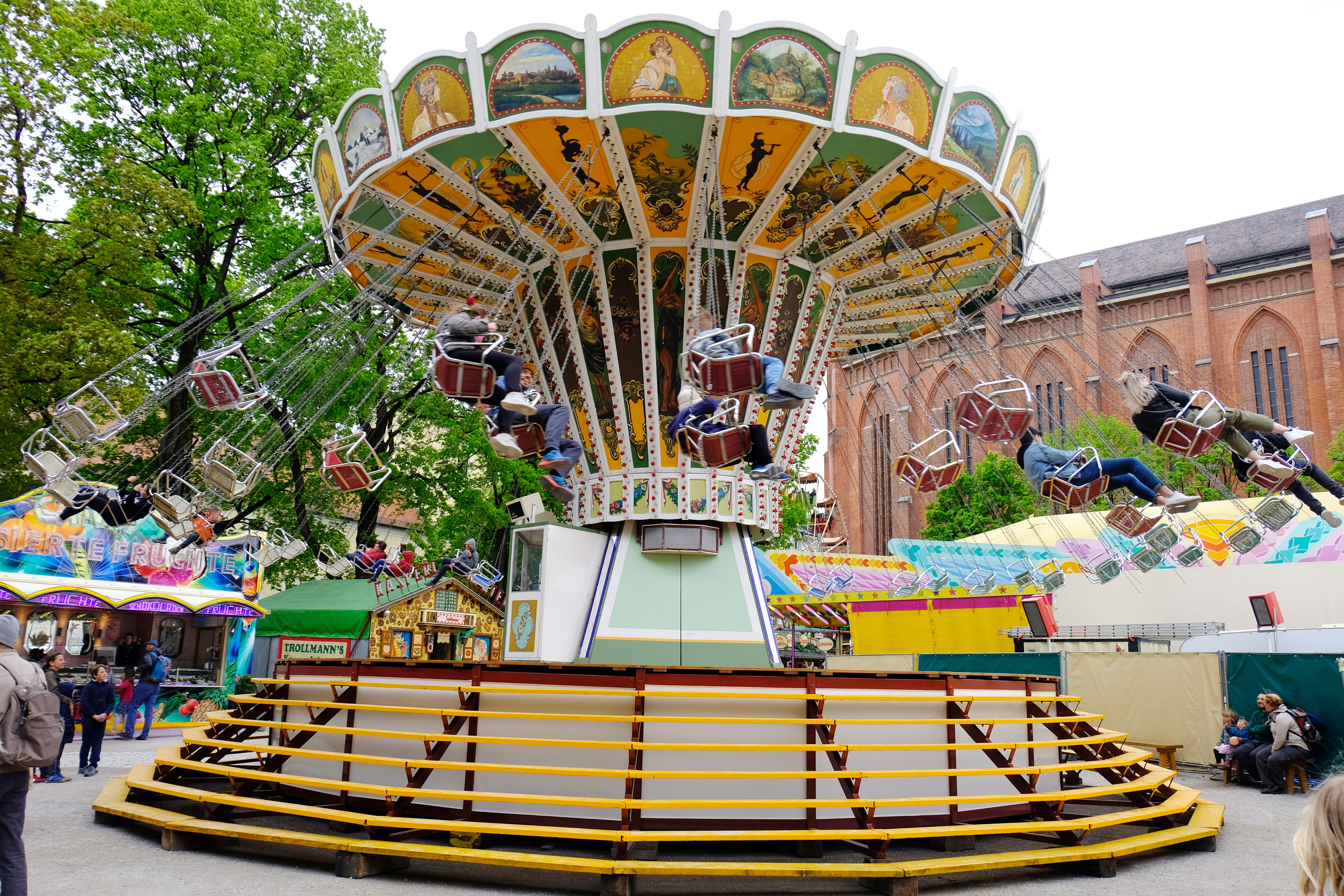 Das Kettenkarussell auf der Auer Dult in München, 2019